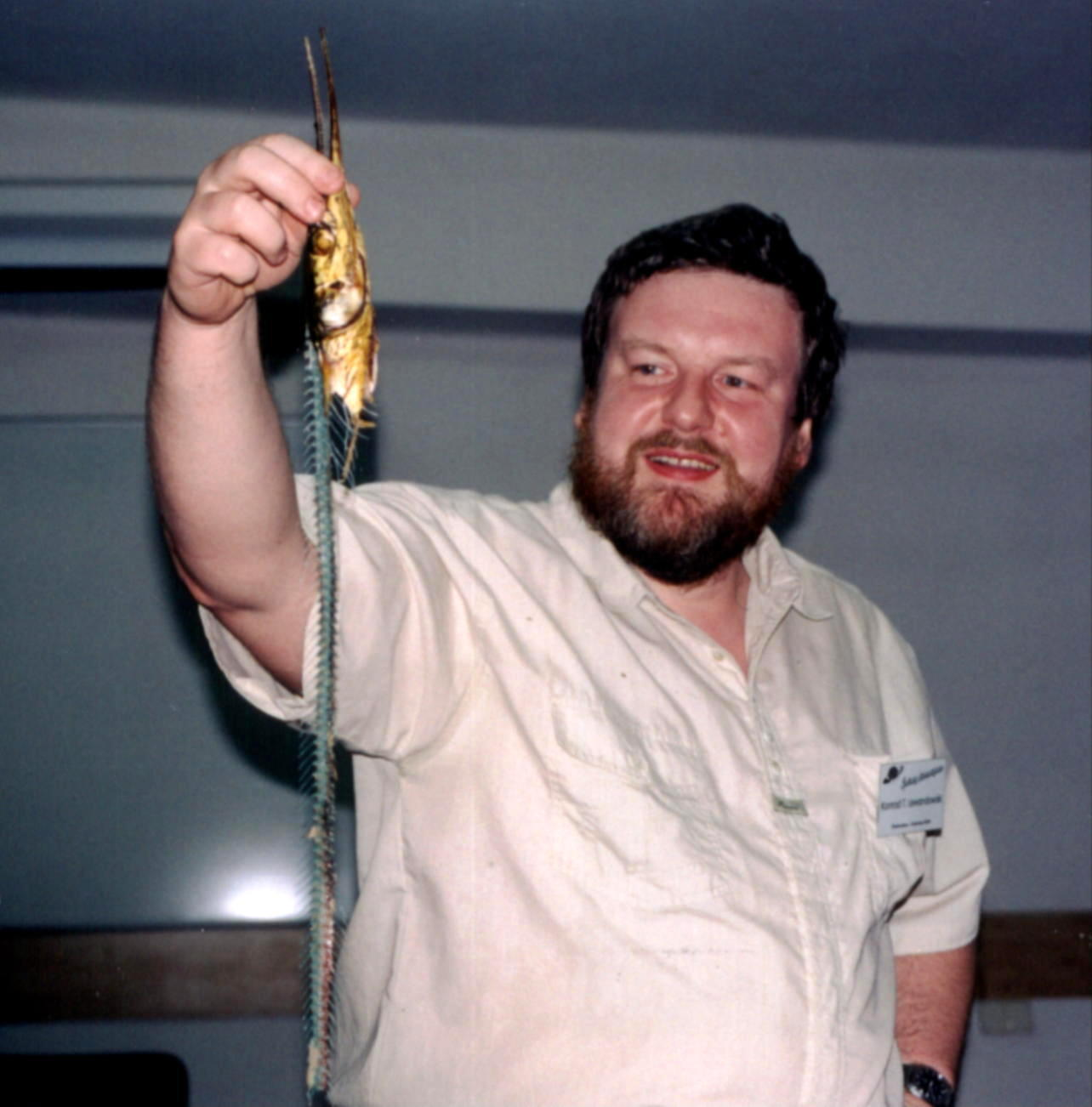 Konrad T. Lewandowski i jego alternatywny słuchacz na Seminarium Literackim organizowanym przez Śląski Klub Fantastyki